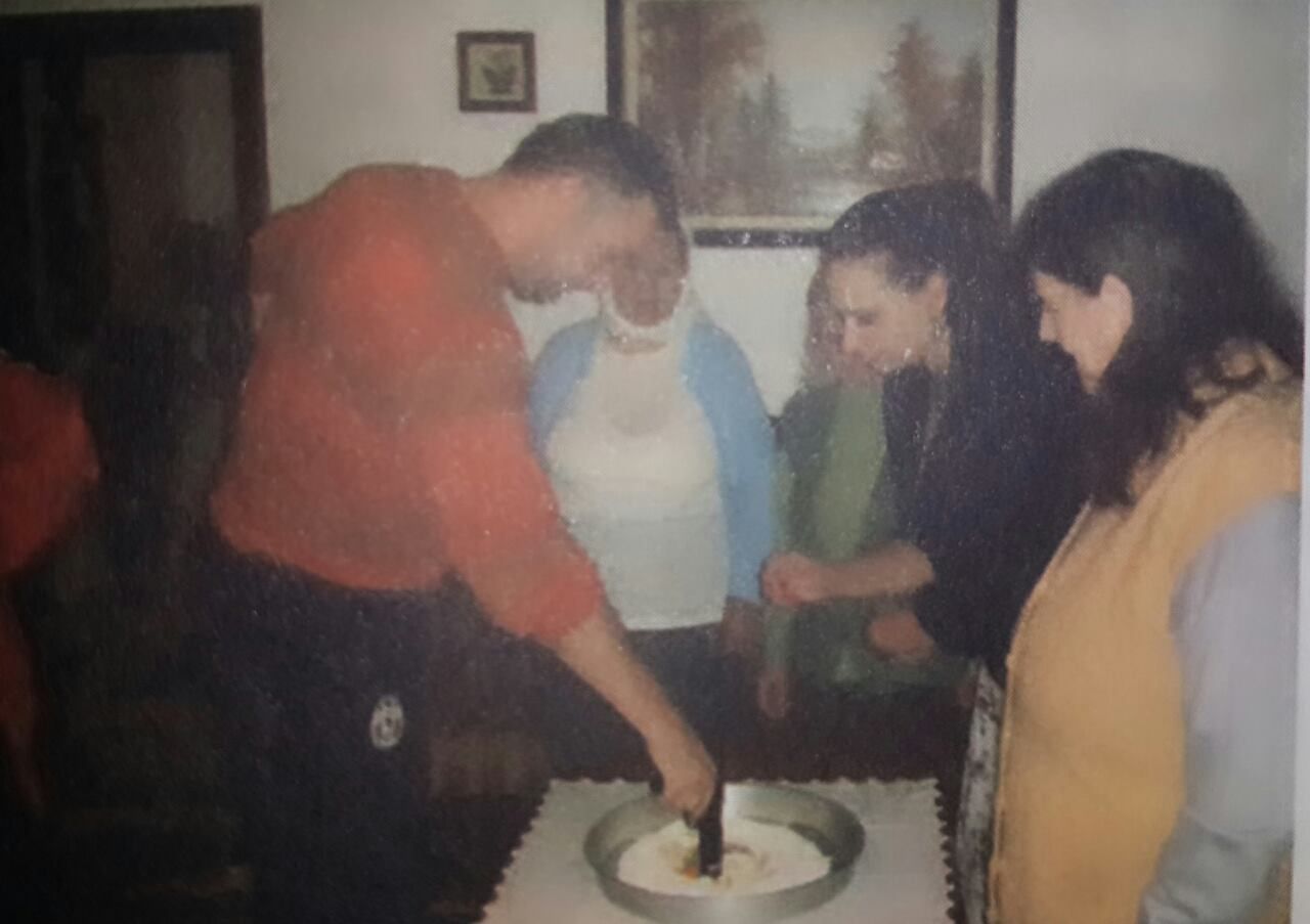 Zënia e kulaçit dhe momenti kur dhëndri e përzien brumin me grykën e revoles